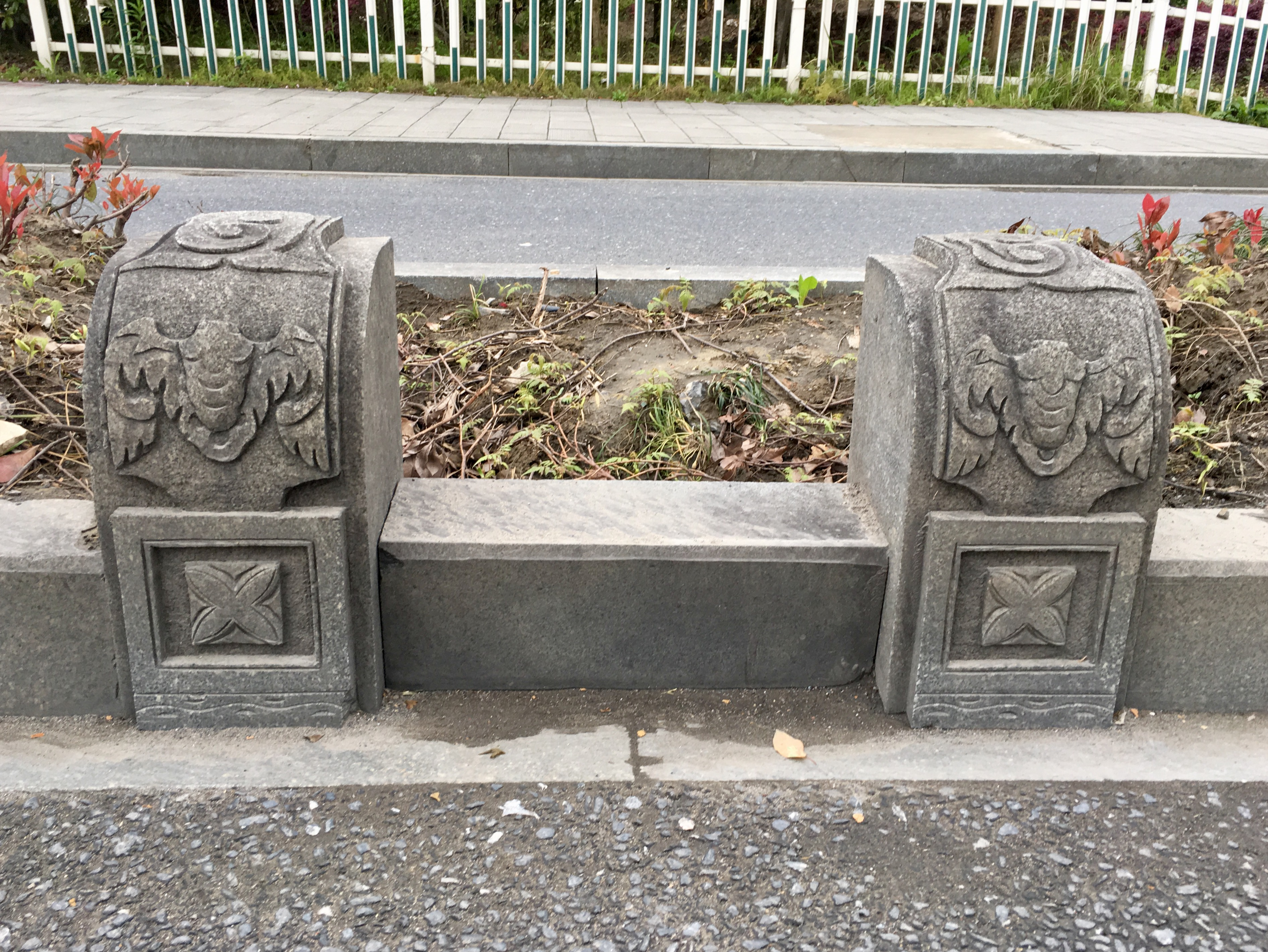 代表沈半路的路墩